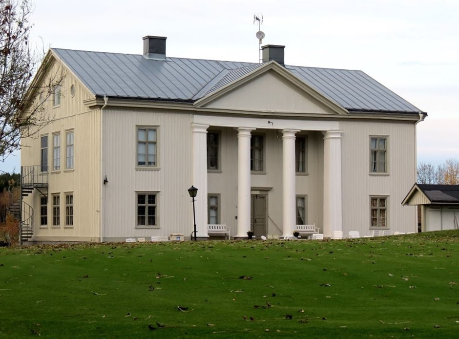 Forsbacka herrgård i norra Dalsland.